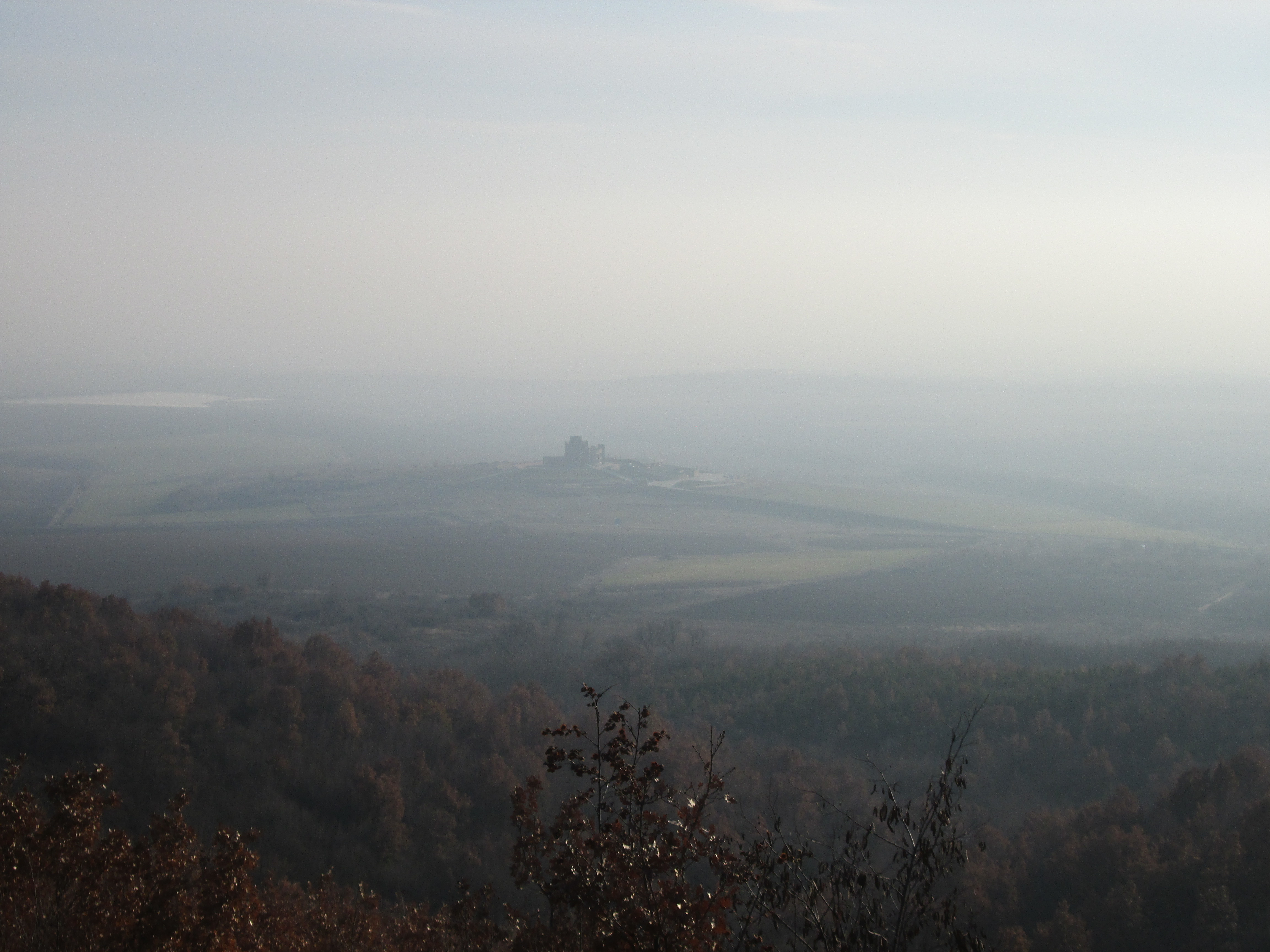 Изглед (посока юг) от най-високата точка на Светиилийските възвишения, връх острия чатал.